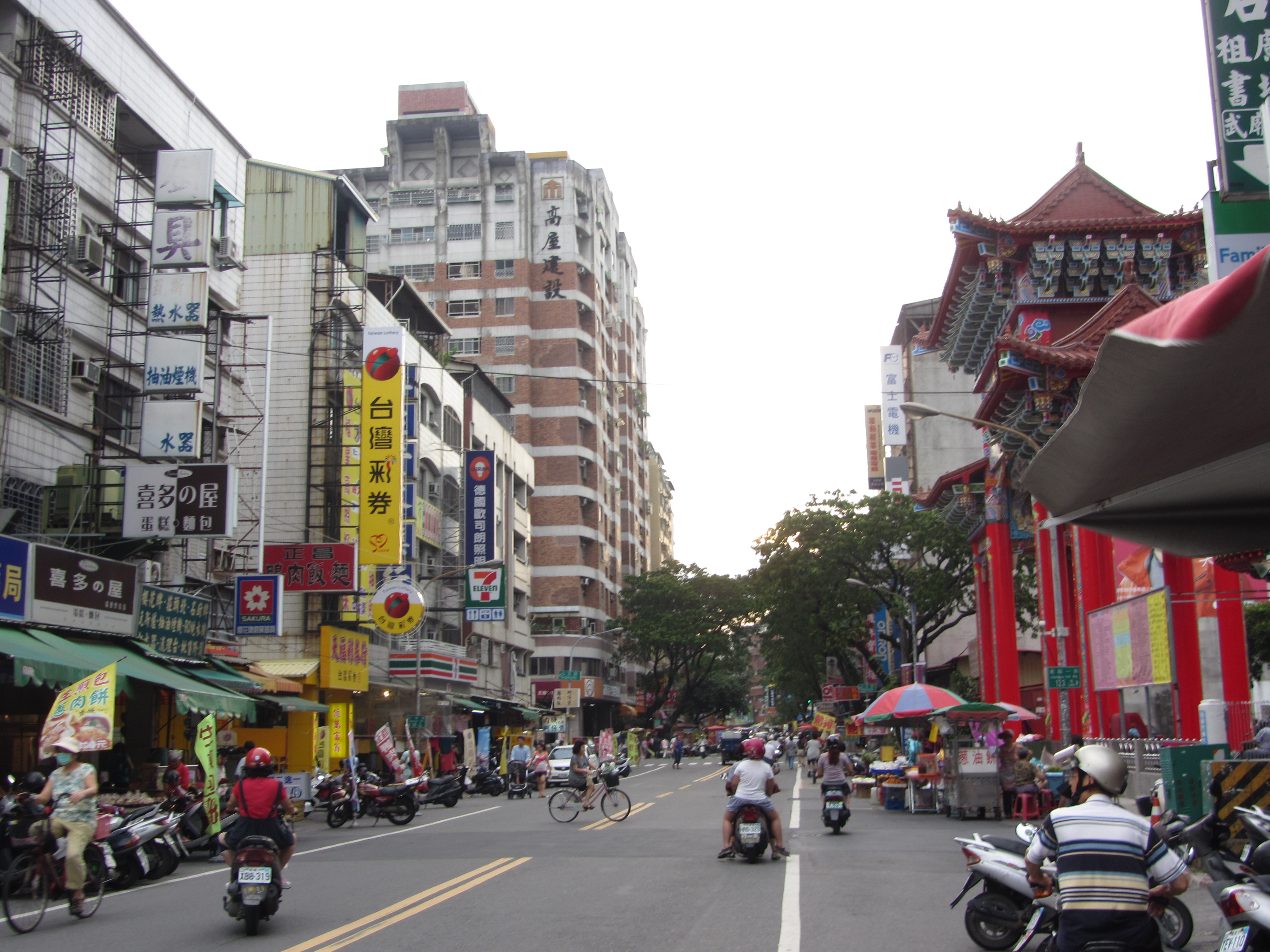 高雄市苓雅區武廟路